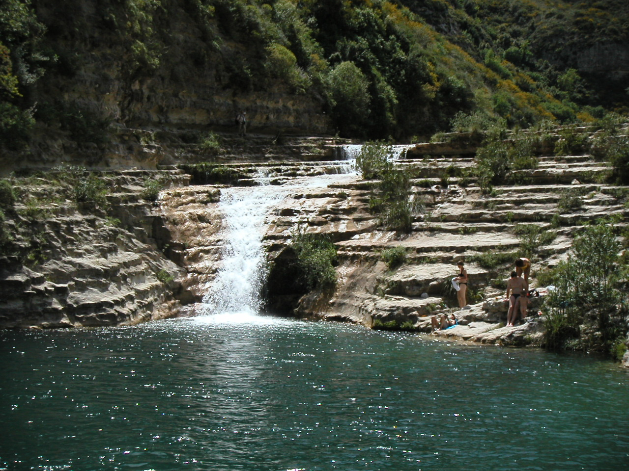 siracusa_cavagrande cassibile_3